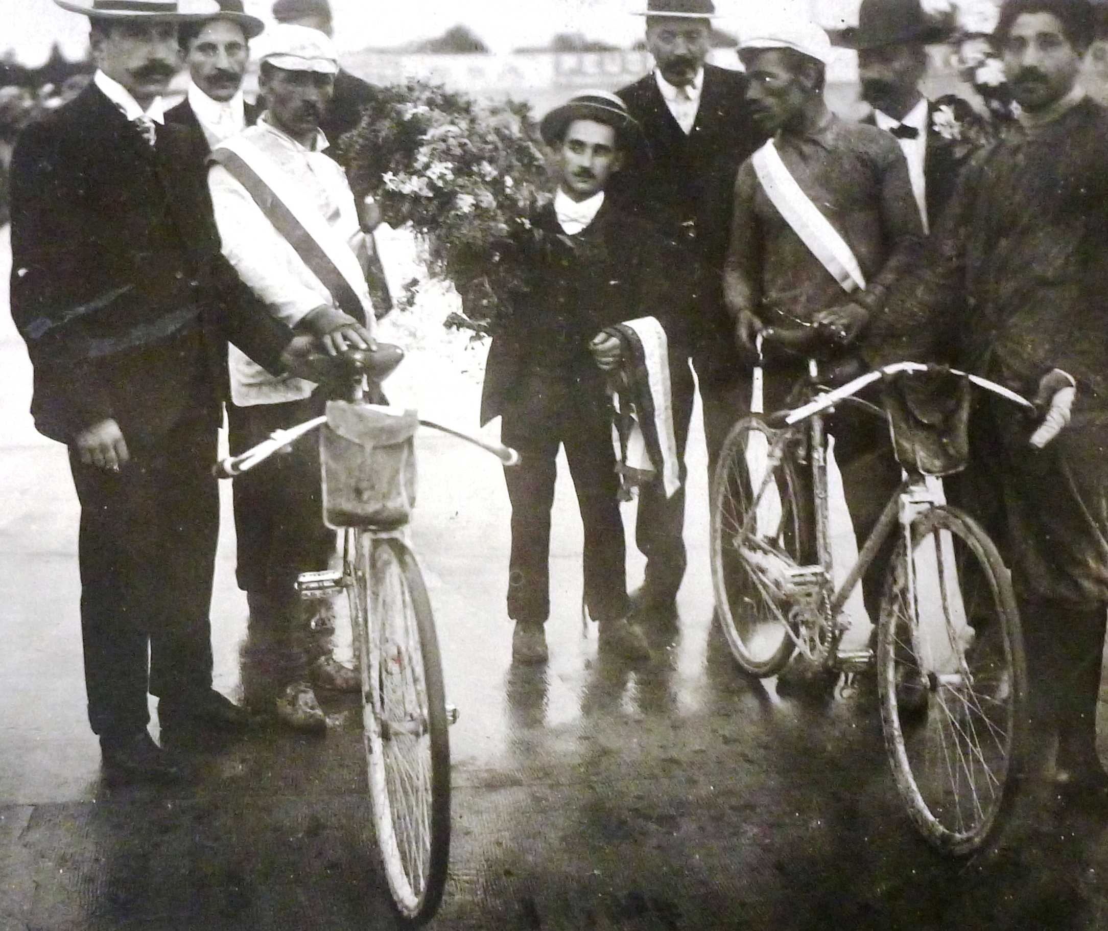 Maurice Garin nach seinem Sieg bei der Tour de France 1903, rechts der Zweitplatziere, Léon Georget